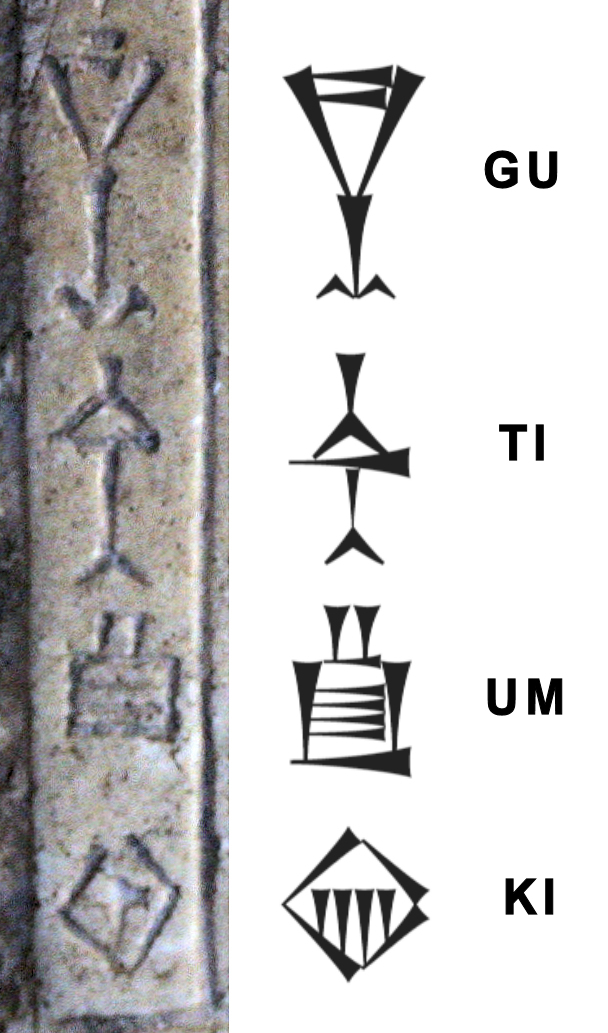 Gutium (name)